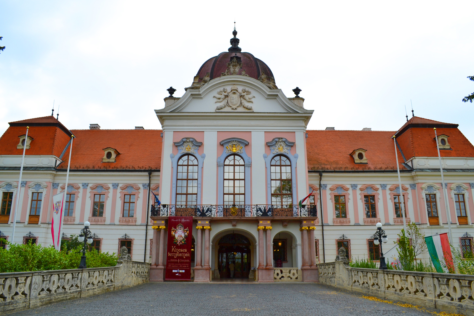 Grassalkovich-kastély (Gödöllő, Martinovics utca 16.) This is a photo of a monument in Hungary, Identifier: 7051